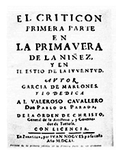 Portada facsímil de la 1ª edición de la Primera Parte de El Criticón (1651)